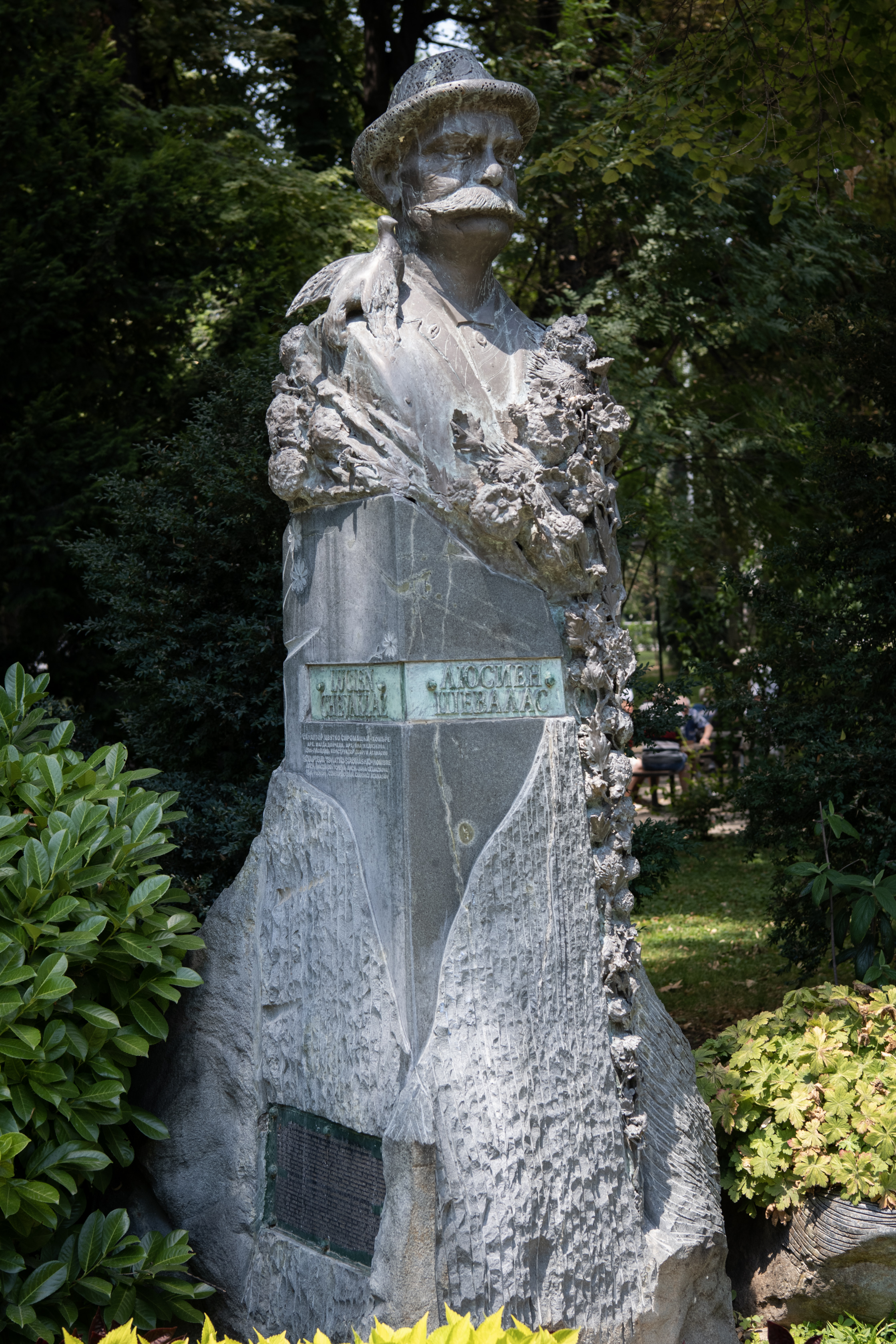 Снимката документира паметника на Люсиен Шевалас в град Пловдив.